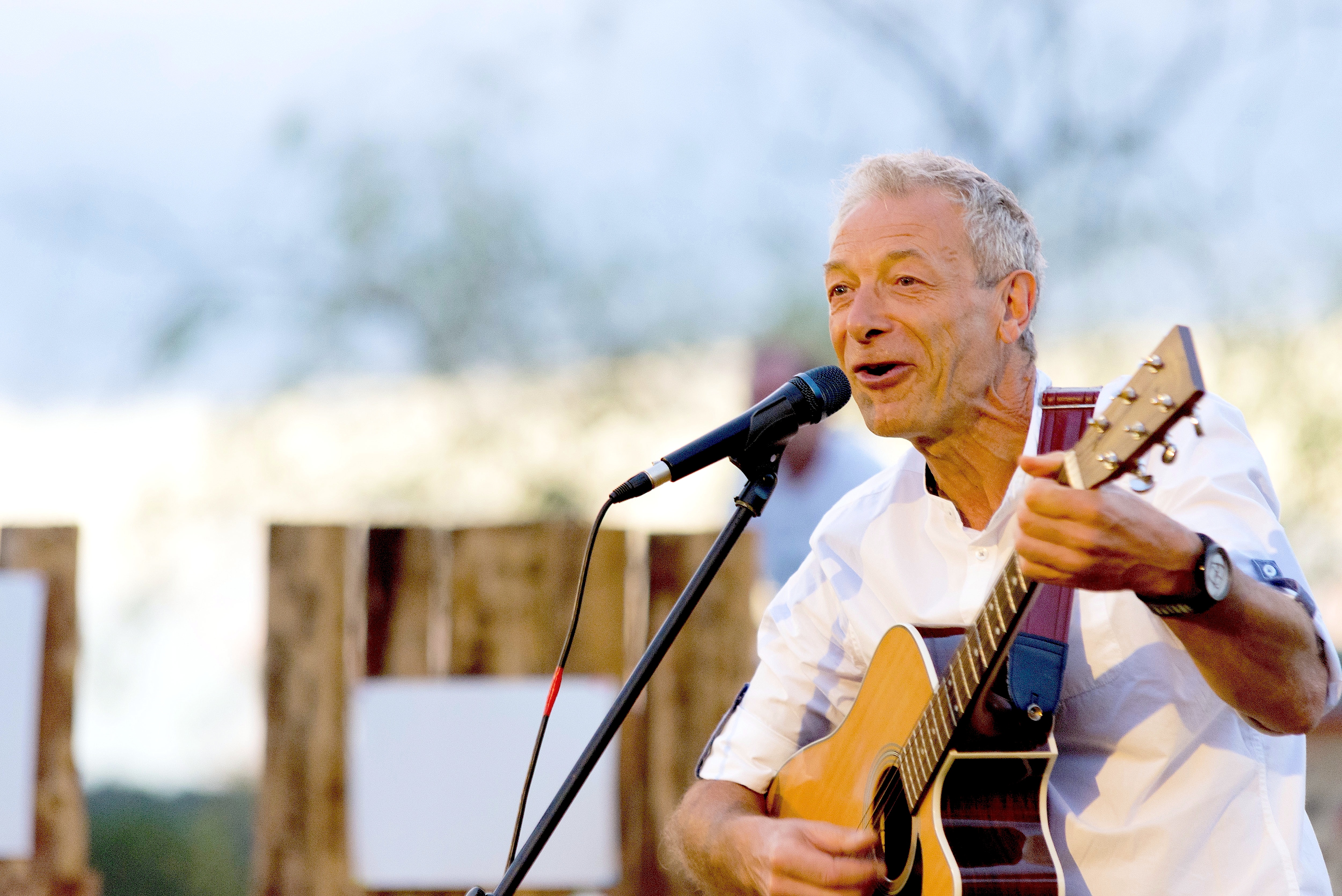 Freddy Zucchet et chanteur et musicien.